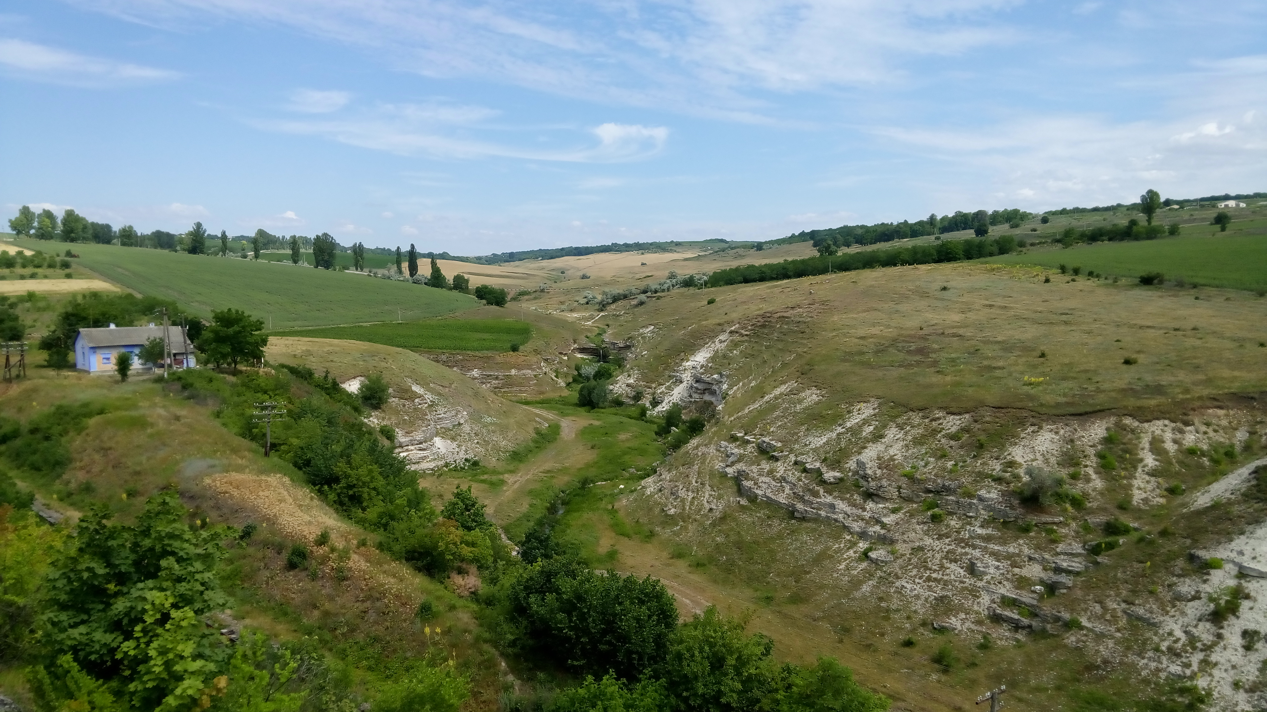 Hligeni, monument al naturii amplasat în raionul Șoldănești, La nord-vest de satul Mateuți, ocolul silvic Șoldănești, Hligeni, parcela 31 (cod MD-SD-rn.A-046) A-046